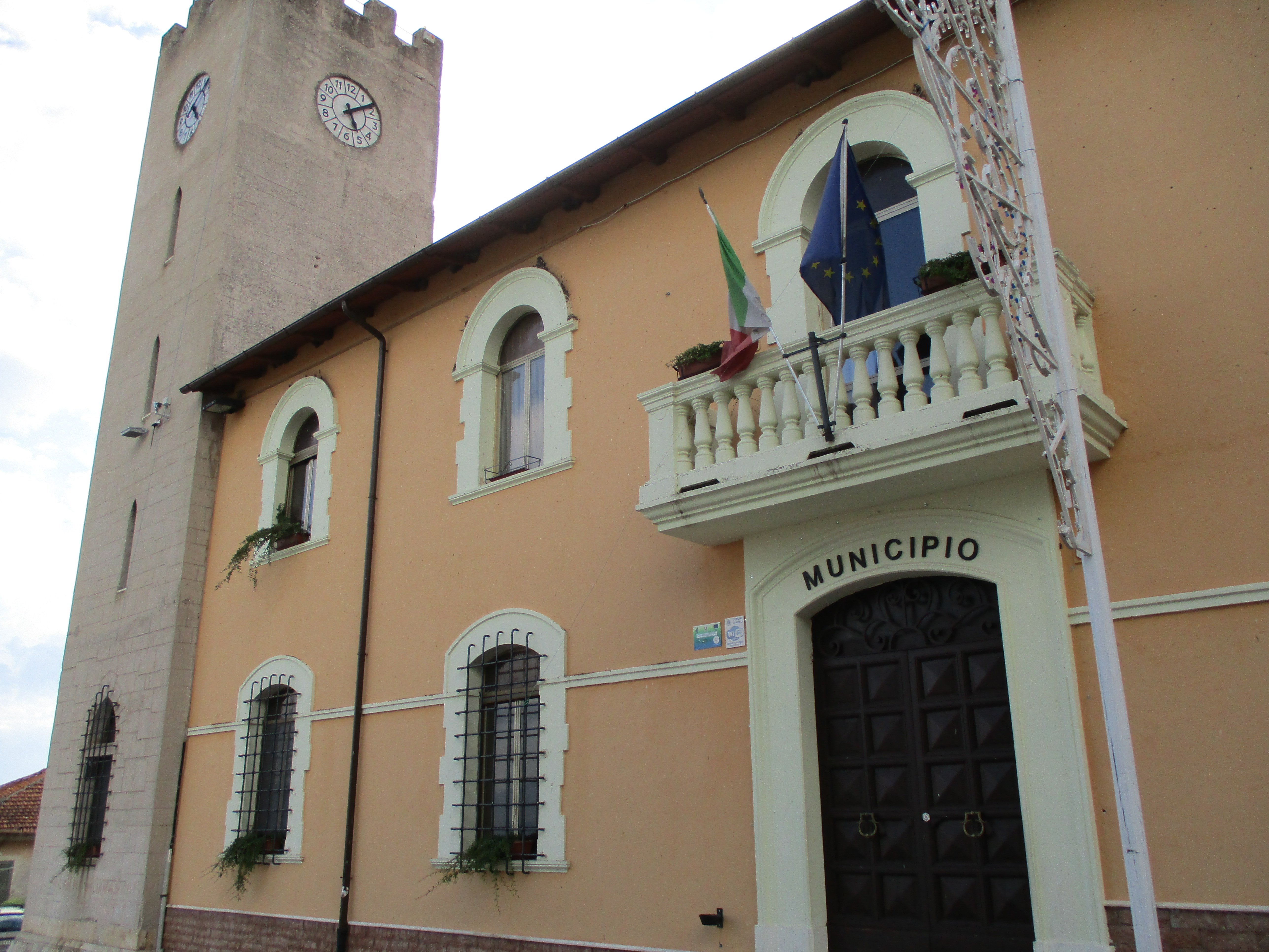 Palazzo municipale ad Aielli Alto